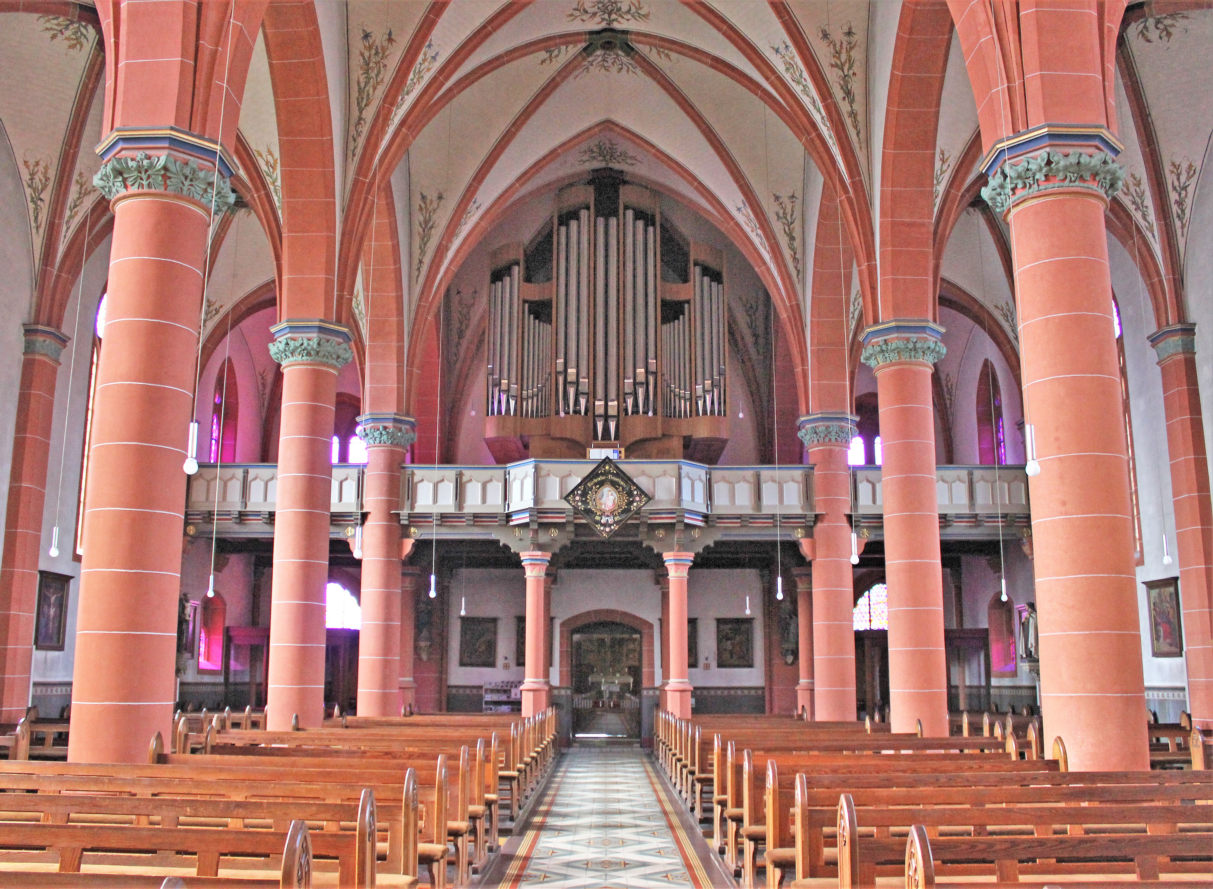 Blick ins Innere der katholischen Pfarrkirche Herz Jesu in Besseringen, einem Stadtteil von Merzig, Landkreis Merzig-Wadern, Saarland